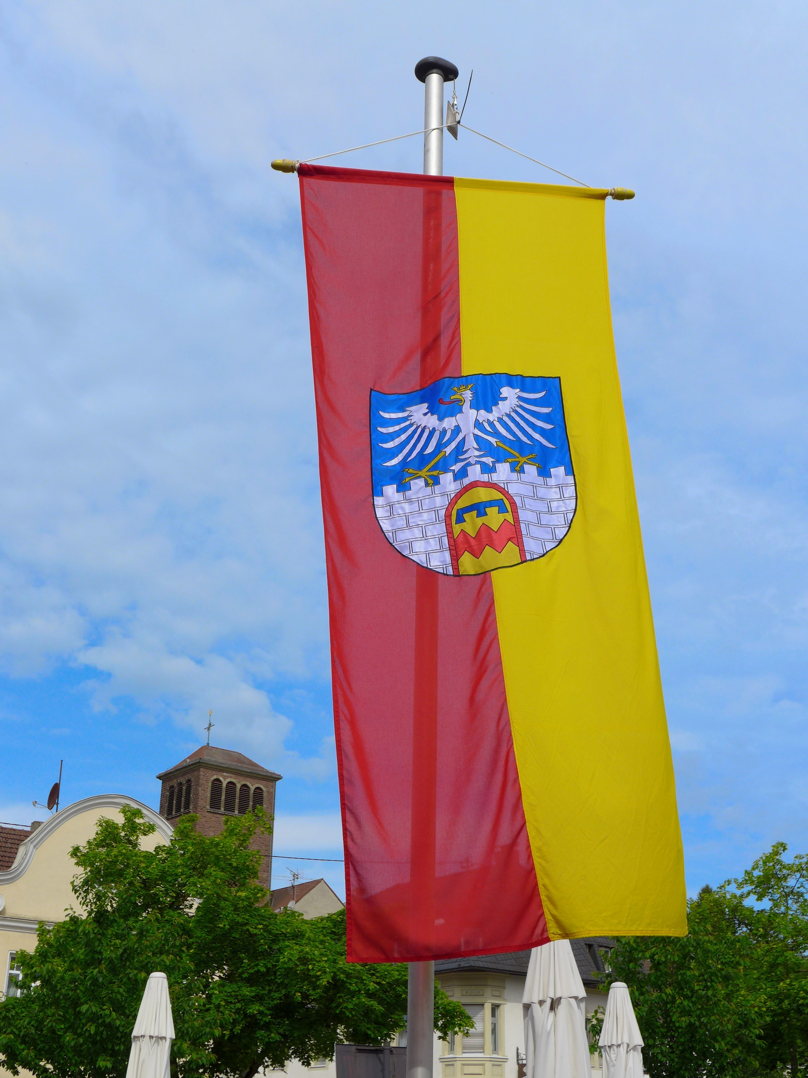 Diefflen, Wappenflagge